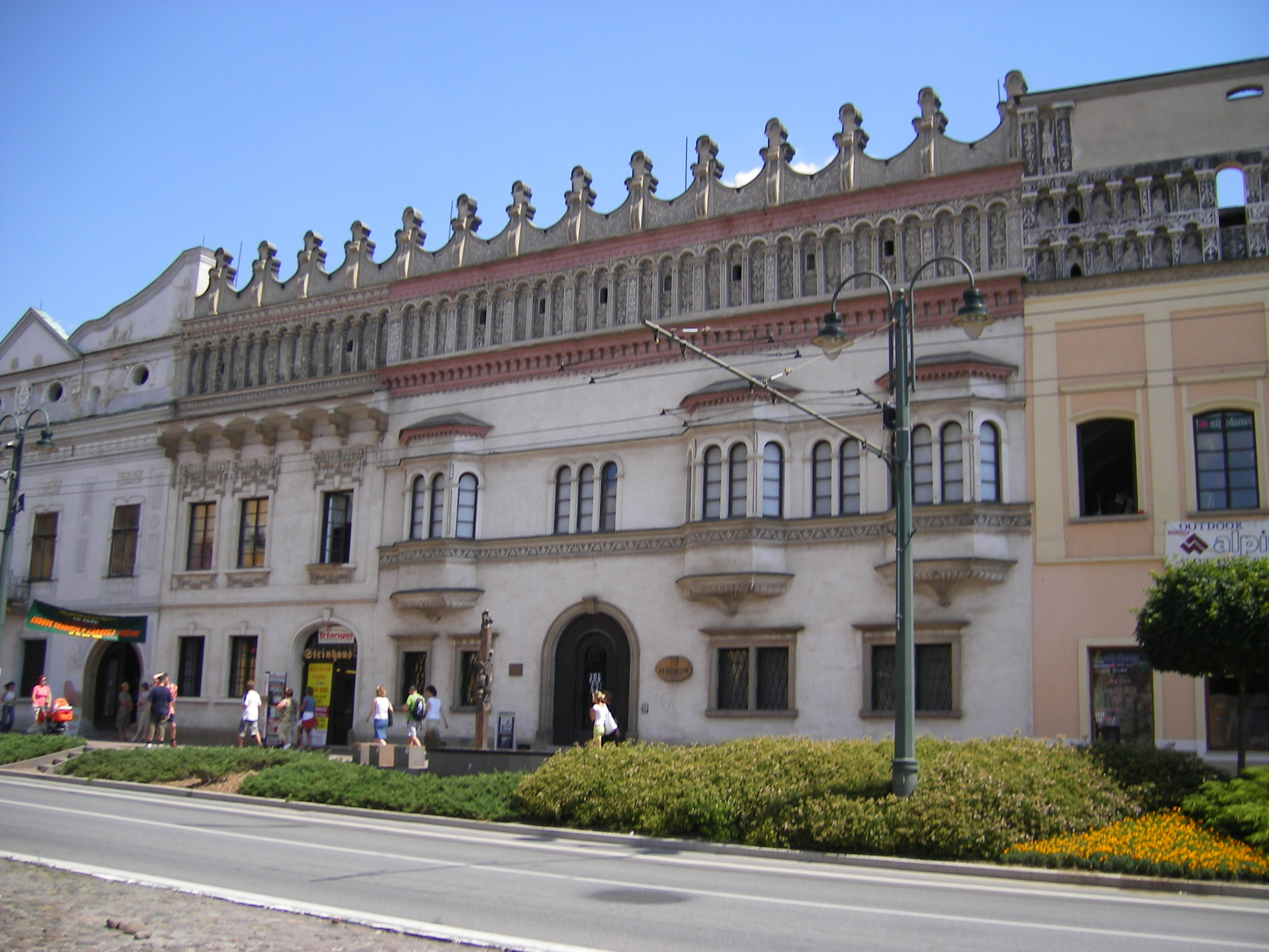 Prešov, Rákóczy House